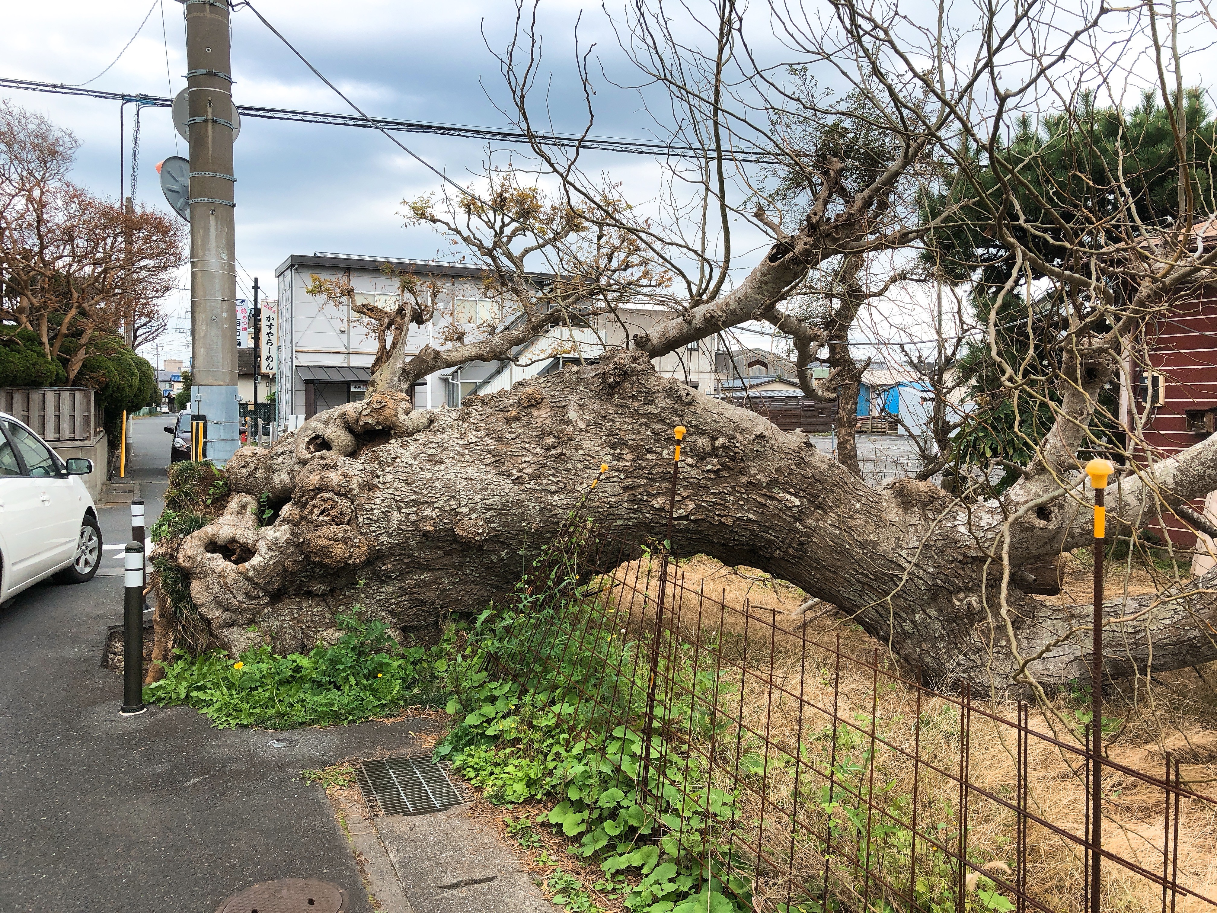 台風15号で倒れたサイカチの木